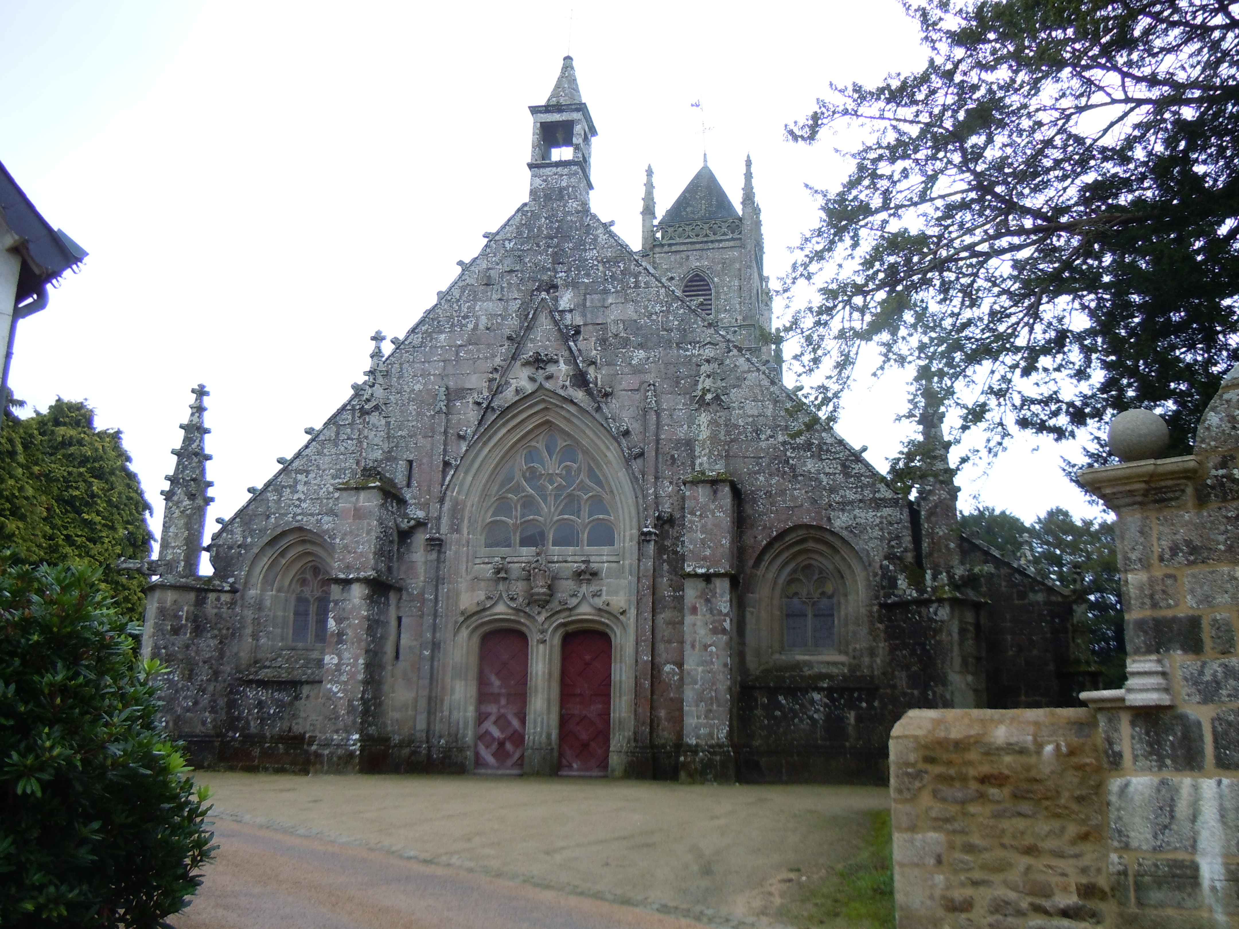 façade ouest de l'église paroissiale de Langonnet (départemeent du Morbihan)